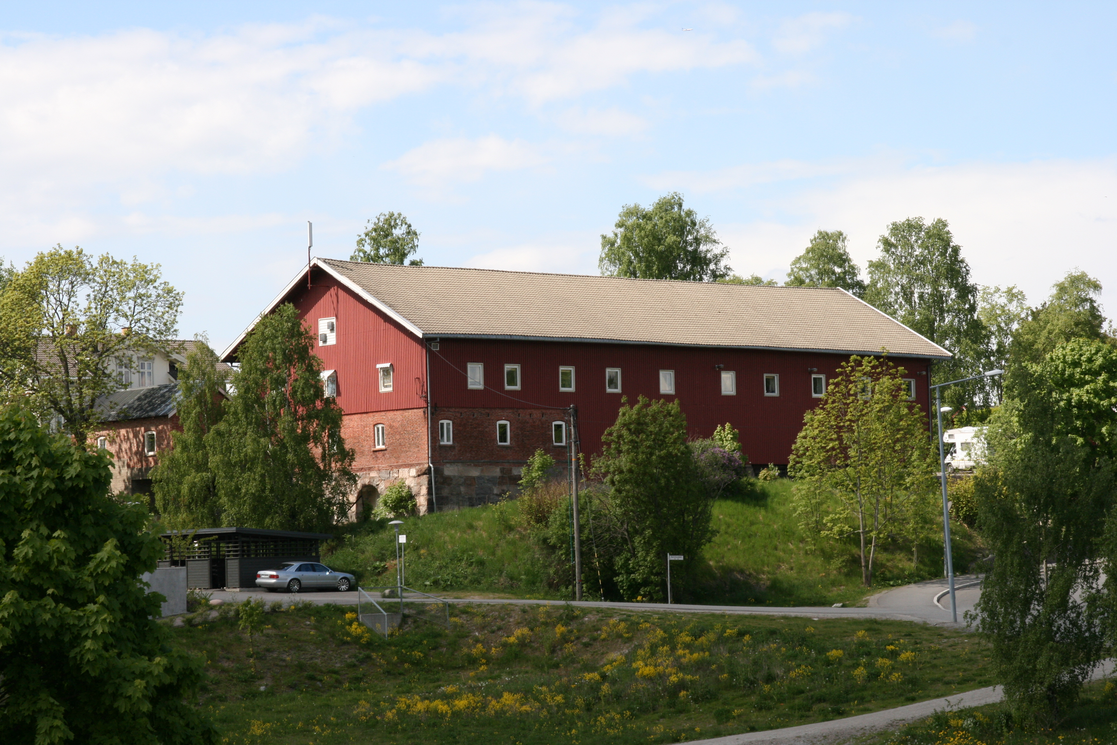 Bøler gård, Oslo